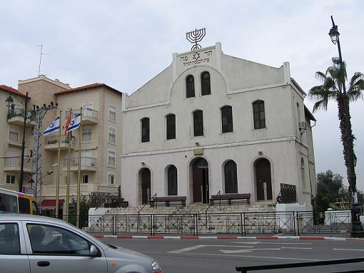 Bildbeschreibung: Synagoge in Rishon Quelle: selbstfotografiert Fotograf/Zeichner: Karolmpa Datum: ? andere Versionen